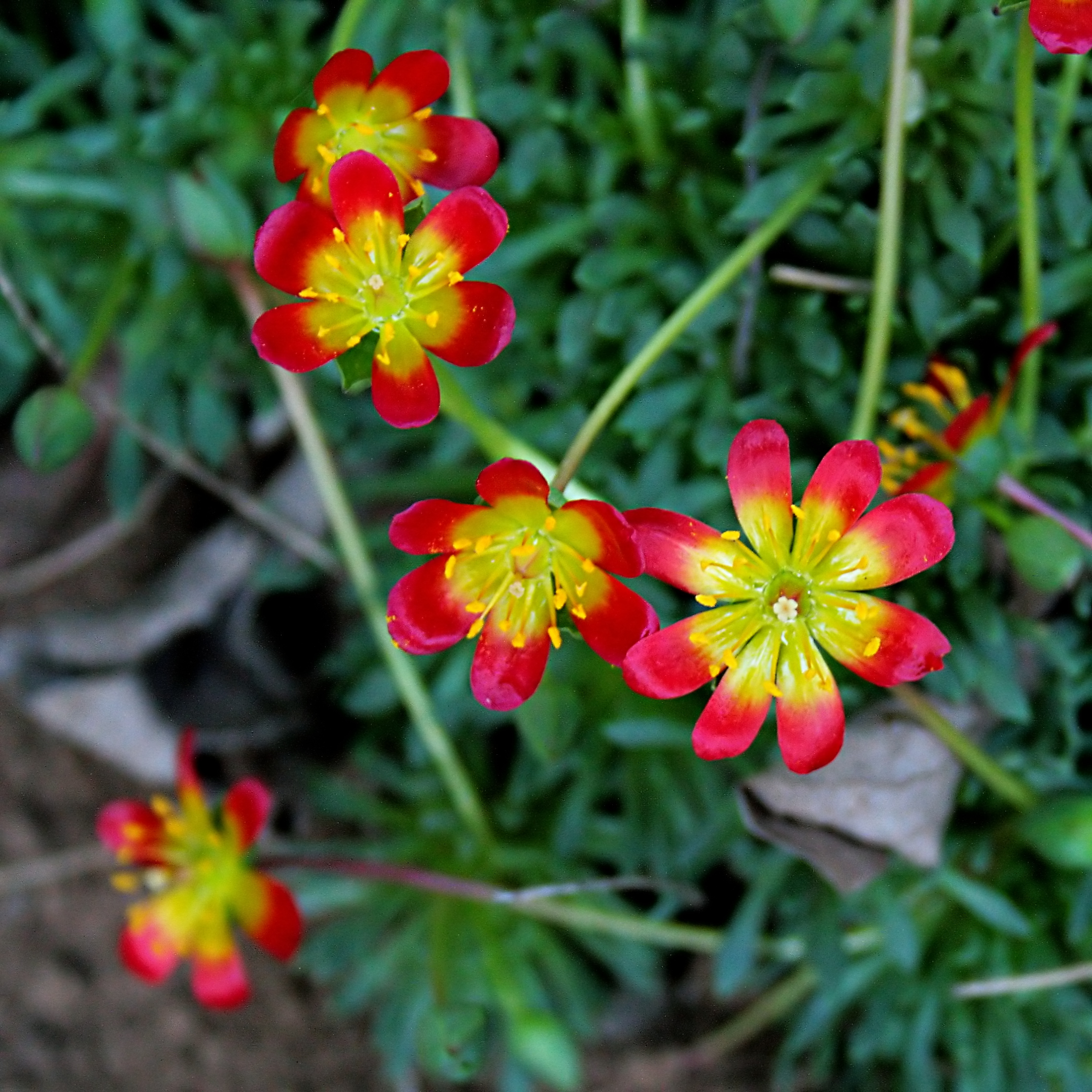 Ísland, Akureyri Botanical Gardens: Calandrinia_caespitosa (Montiaceae)